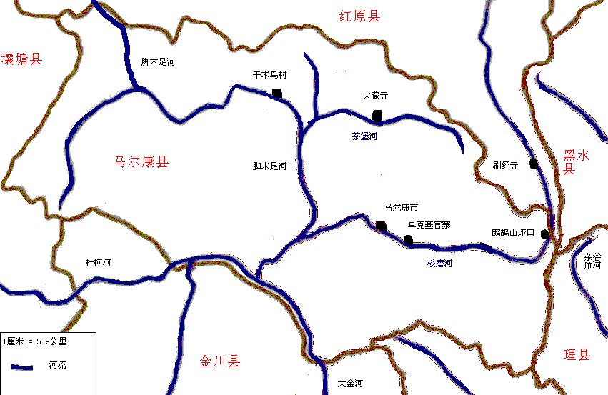 马尔康县地图（作者：向柏霖）